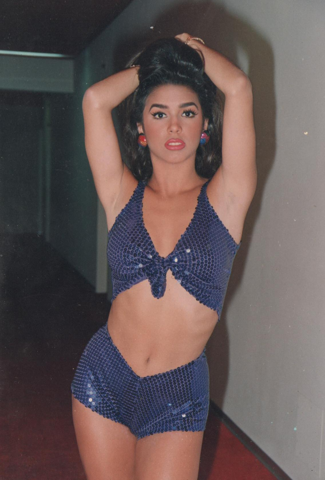 Yo mismo tome la foto antes de un concierto en Lima Peru, I take this picture before a concert in Lima Peru.